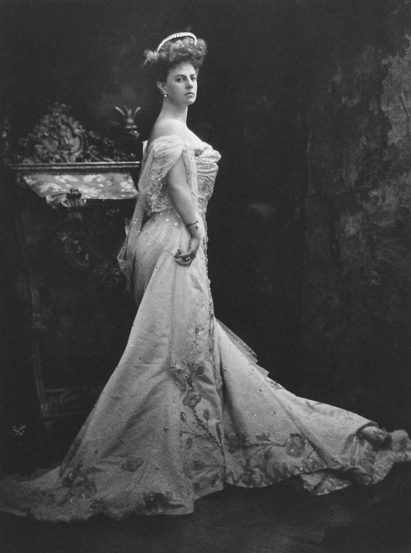 Élisabeth de Riquet, comtesse de Caraman-Chimay